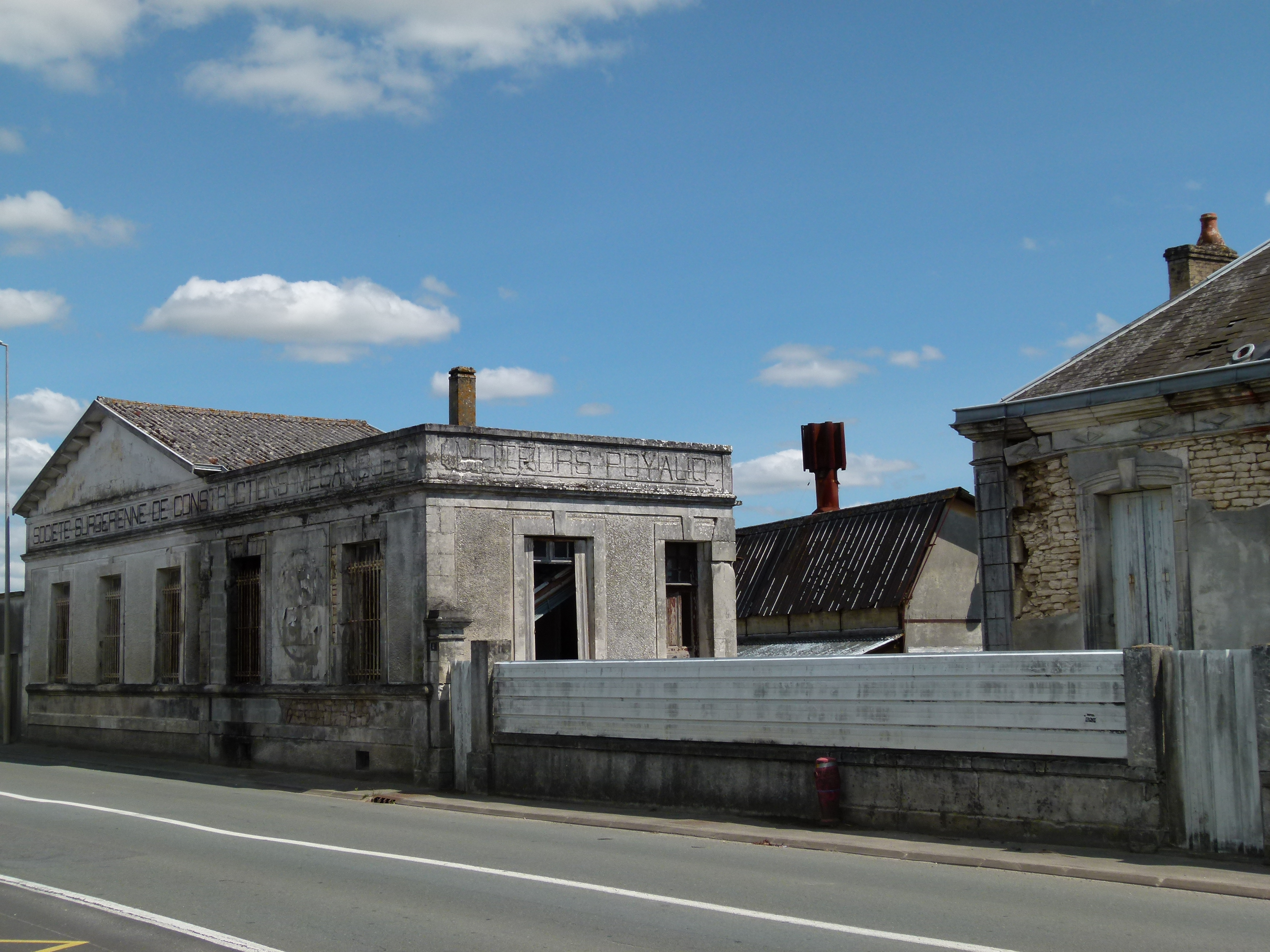 L'ancienne usine de fabrication des moteurs Poyaud est située sur l'avenue de la Gare à Surgères.